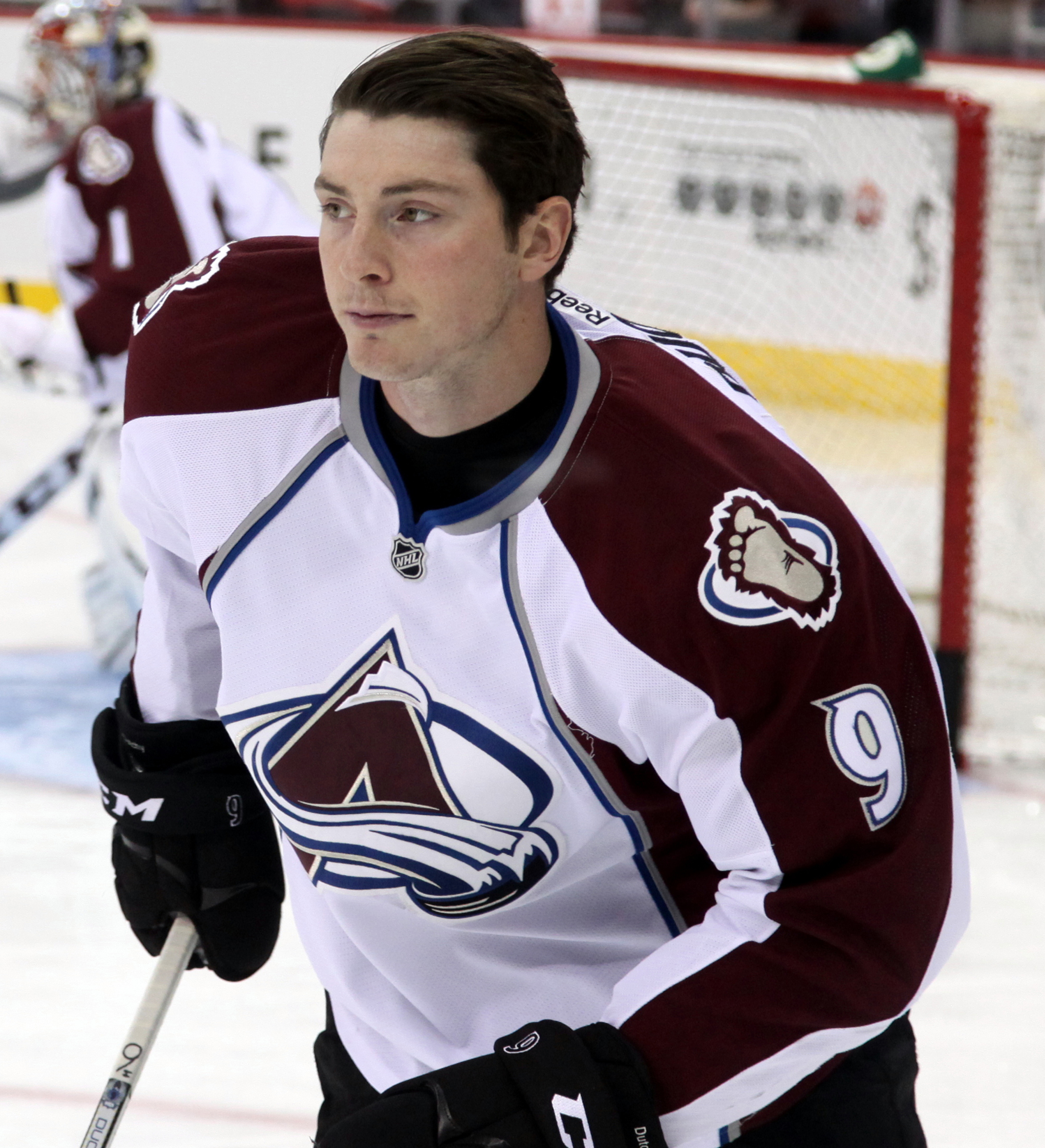 Duchene in November 2014.